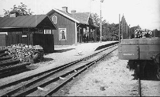 Swedish railway station Piksborg, Halmstad-Bolmens Järnväg